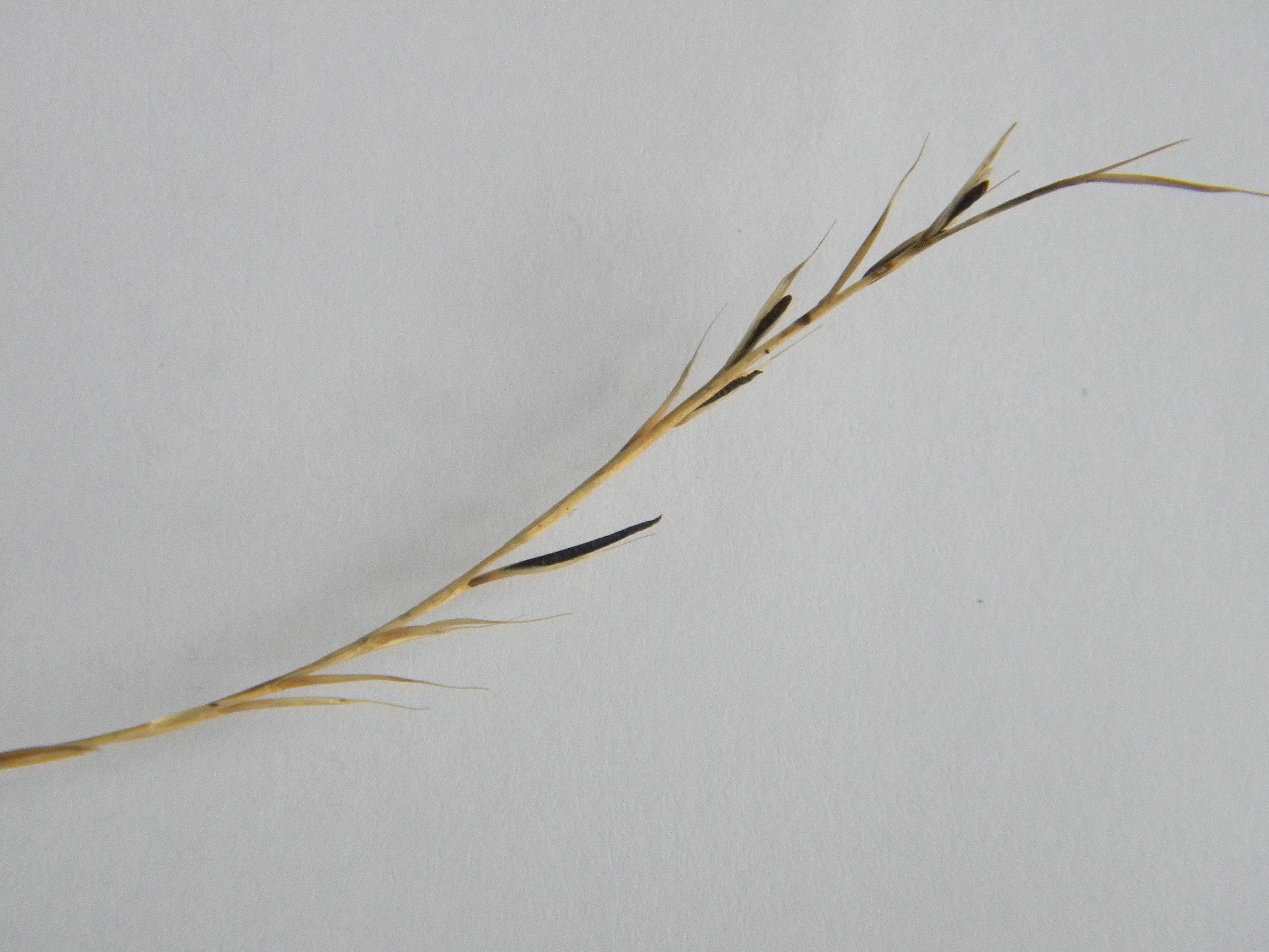 Nardus stricta avec ergot